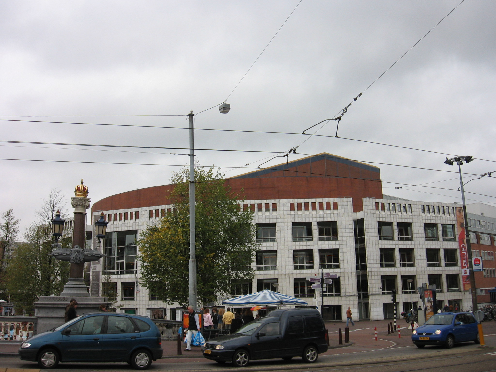 Stopera